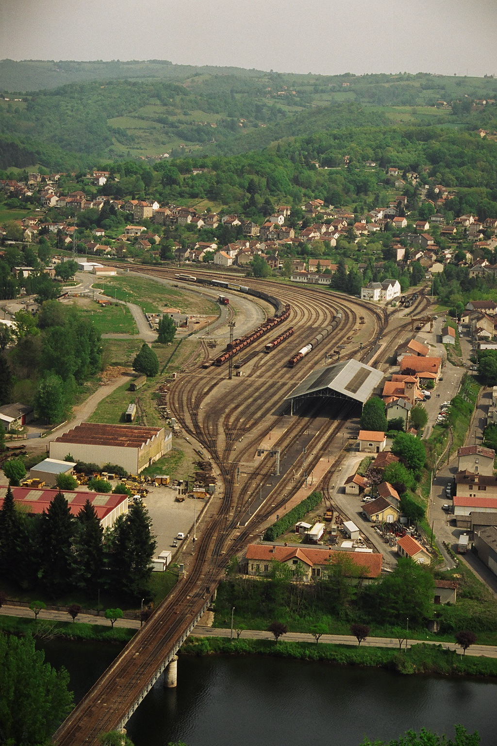 Photo personnelle 2004